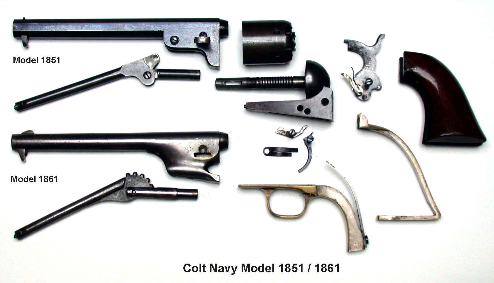 Colt Navy Model 1851 / 1861 Revolvers, partially stripped.